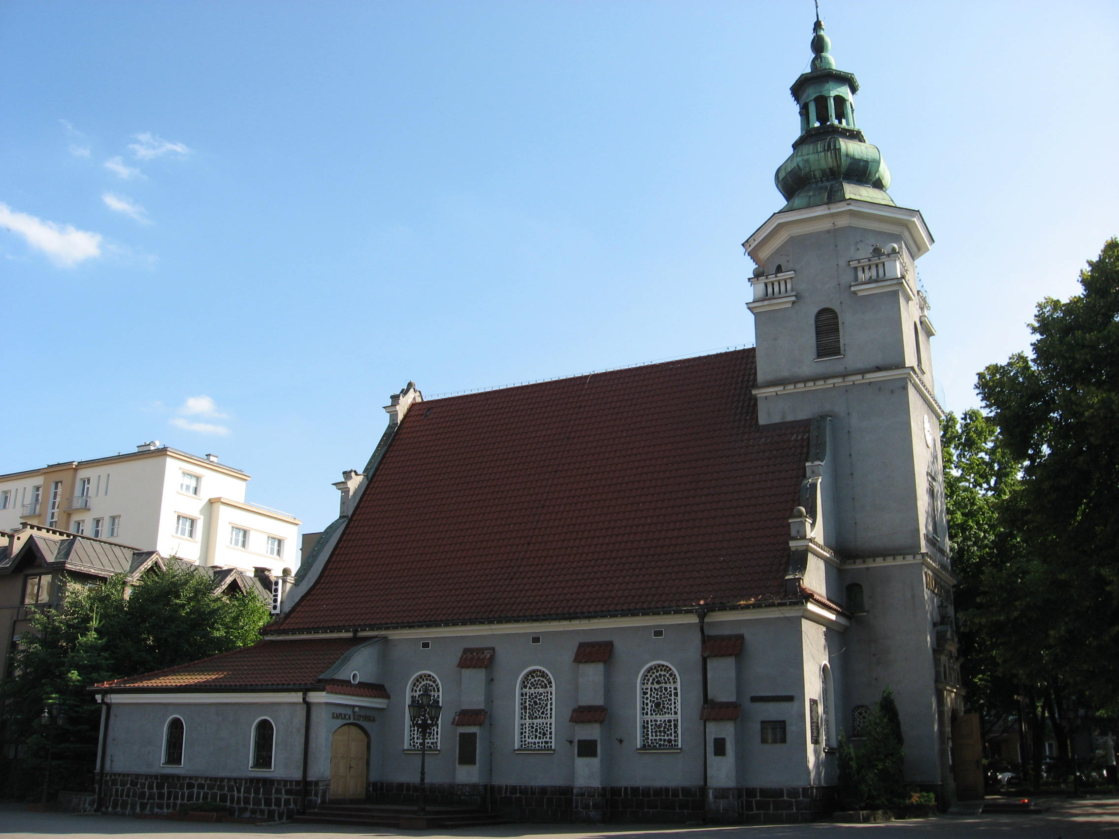 Kościół parafialny pw. Najświętszej Marii Panny Królowej Polski w Gdyni.